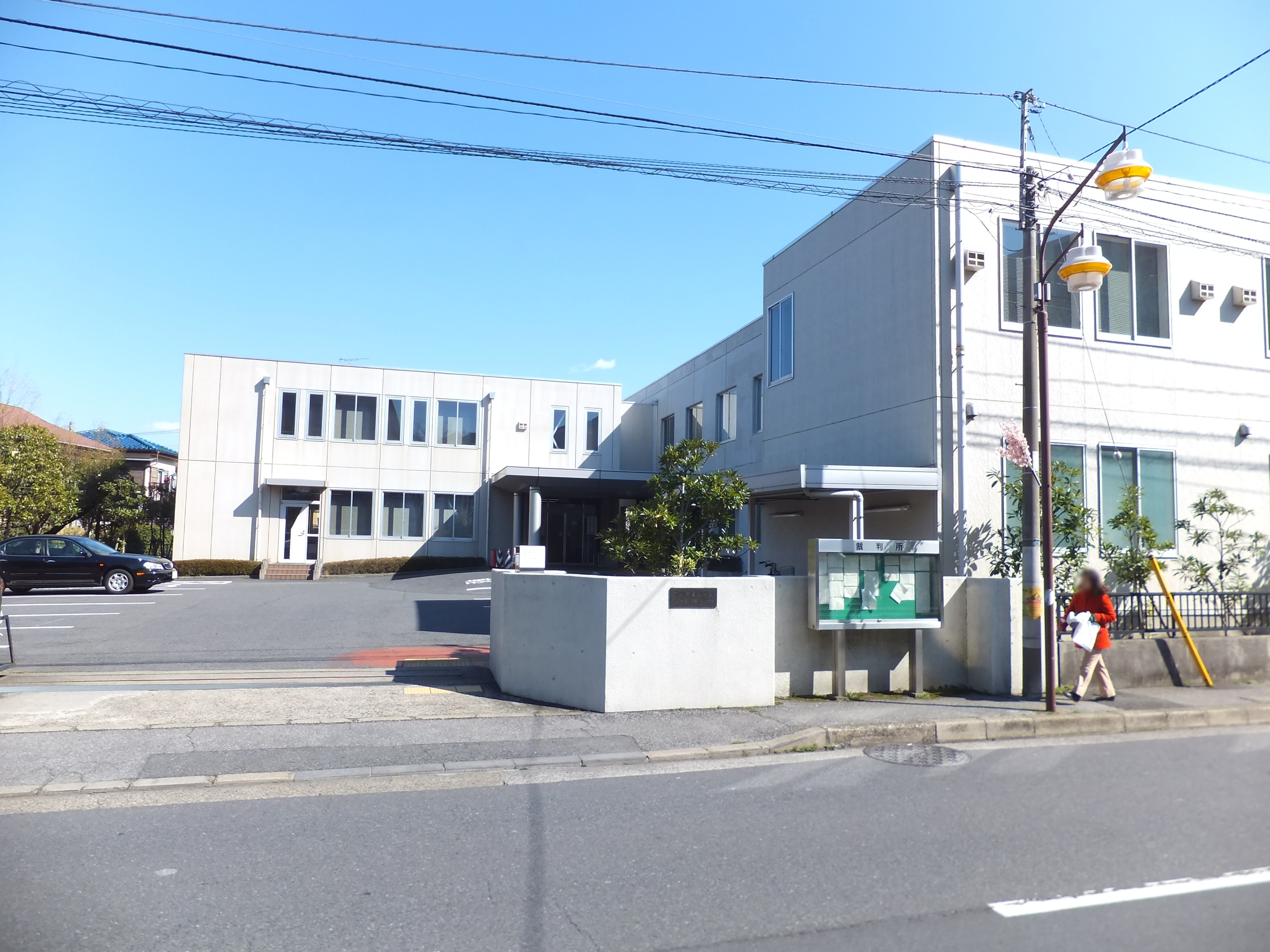 市川簡易裁判所(千葉県市川市)